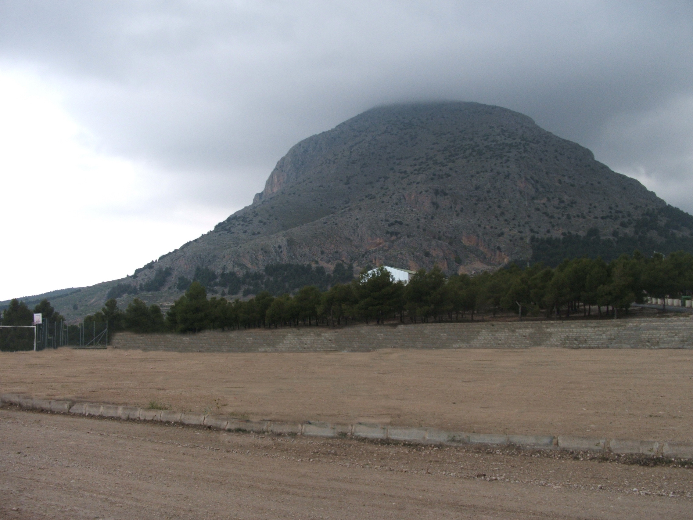 Esta imagen la tomé en mi viaje a Vélez-Blanco, en el norte de la Provincia de Almería, España, concretamente desde el Camping Pinar del Rey. La visión de los alrededores estaba dominada por esta montaña (en la que, por cierto, se encuentra la famosa Cueva de los Letreros), ya de por sí imponente, pero aquel día, en el que el cielo estaba cubierto con nubes oscuras, la montaña ofrecía un aspecto que bien podría haber sido sacado de una película de terror.